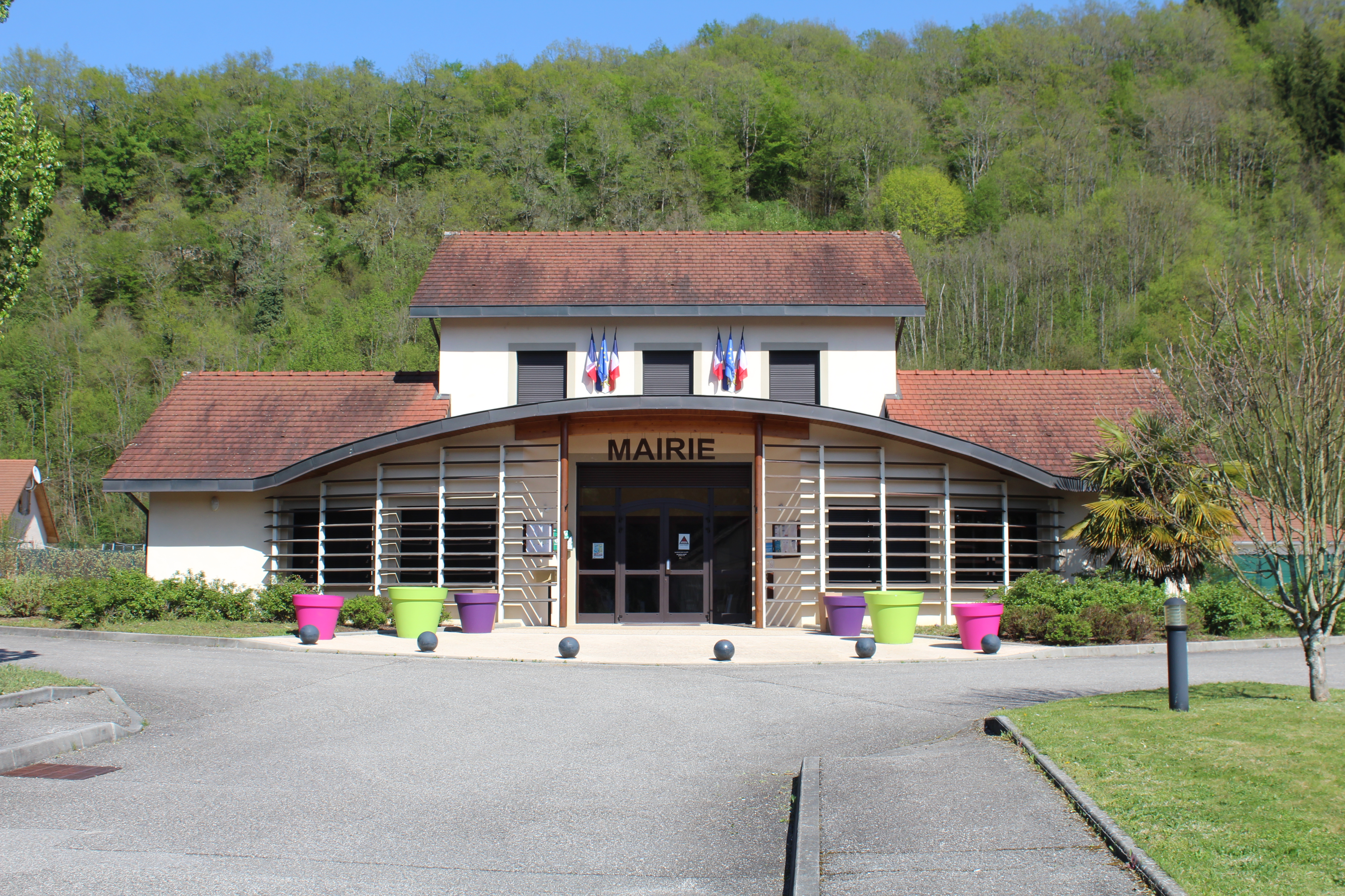 Mairie de Chazey-Bons.